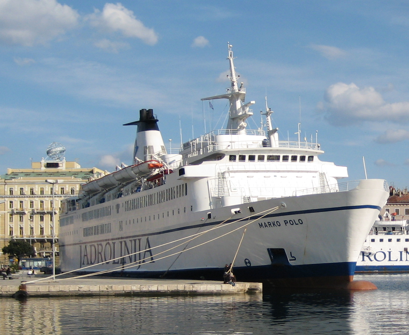 Marko Polo u Rijeci